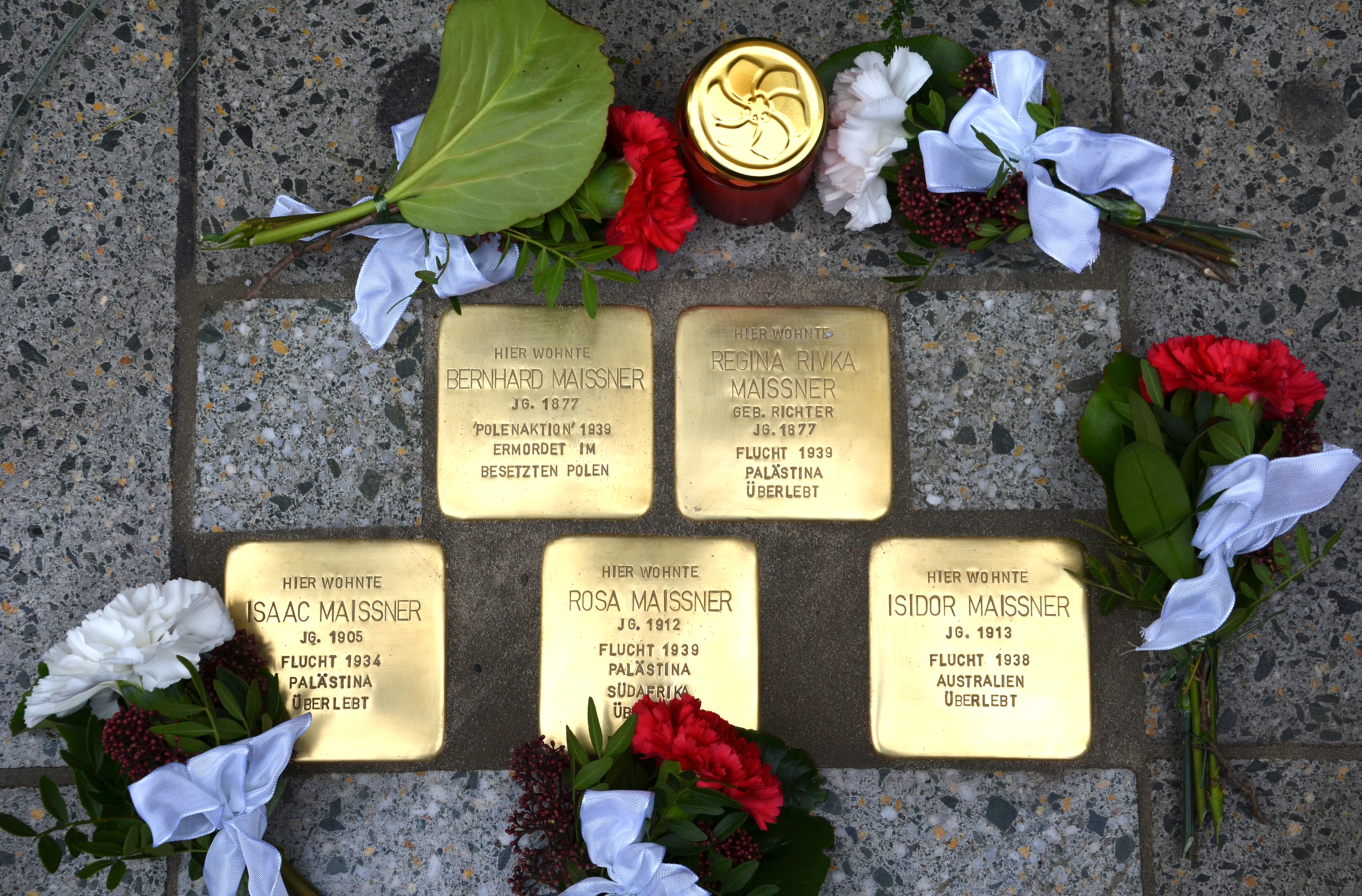 Mit frischen Blumen und einer Kerze: Die fünf Stolpersteine der Familie Maissner (zugleich verwandt mit der Familie um Israel Alter) vor dem heutigen Gebäude Lange Laube 1 in Hannover, zu deren Verlegung und zum gemeinsamen Gedenken die Verwandten und Nachfahren im November 2013 für mehrere Tage angereist waren aus Kanada, Südafrika und Israel ...